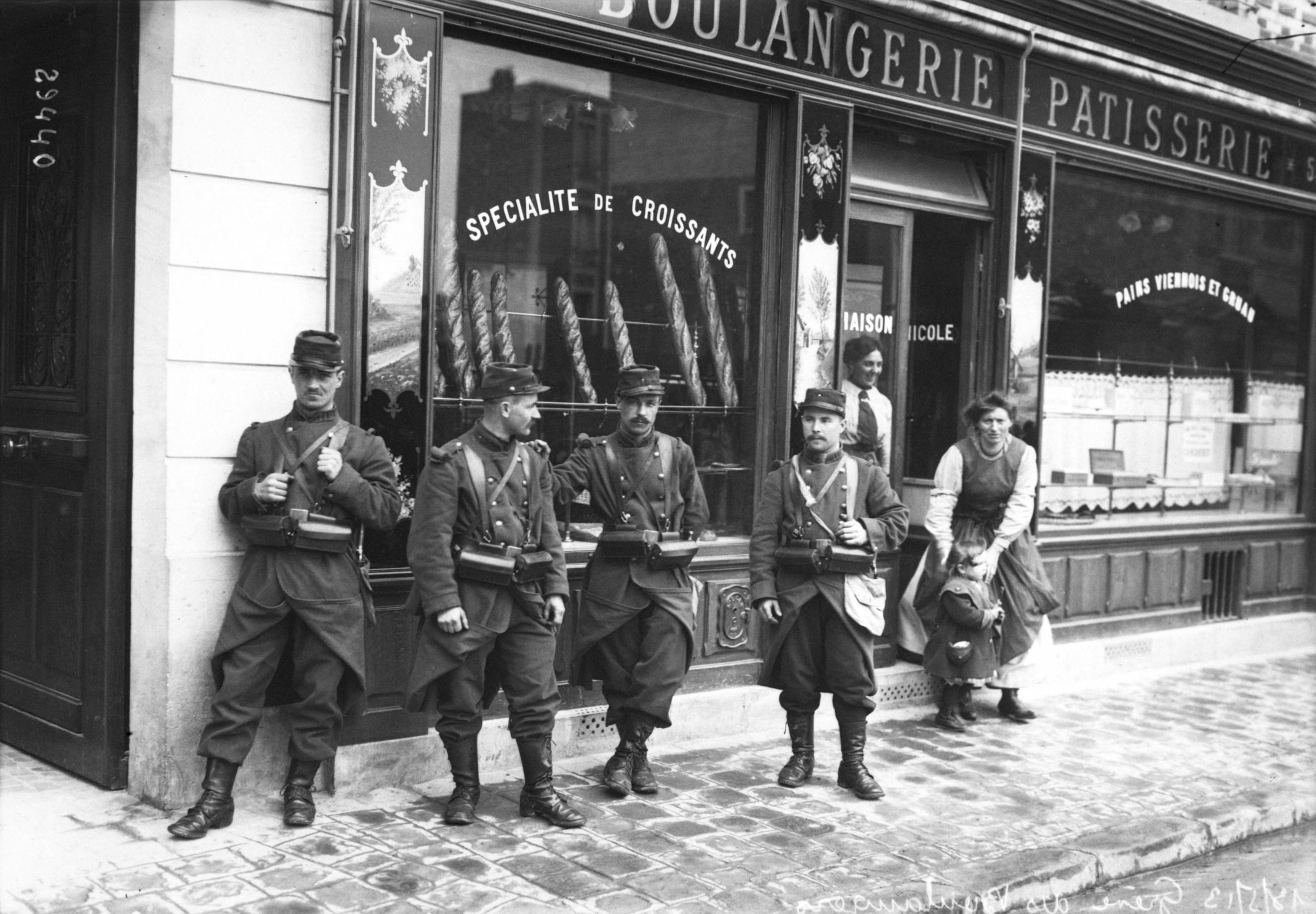 18-5-13, grèves des boulangers [soldats du 119e régiment d'infanterie devant une vitrine de boulangerie] : [photographie de presse] / [Agence Rol]